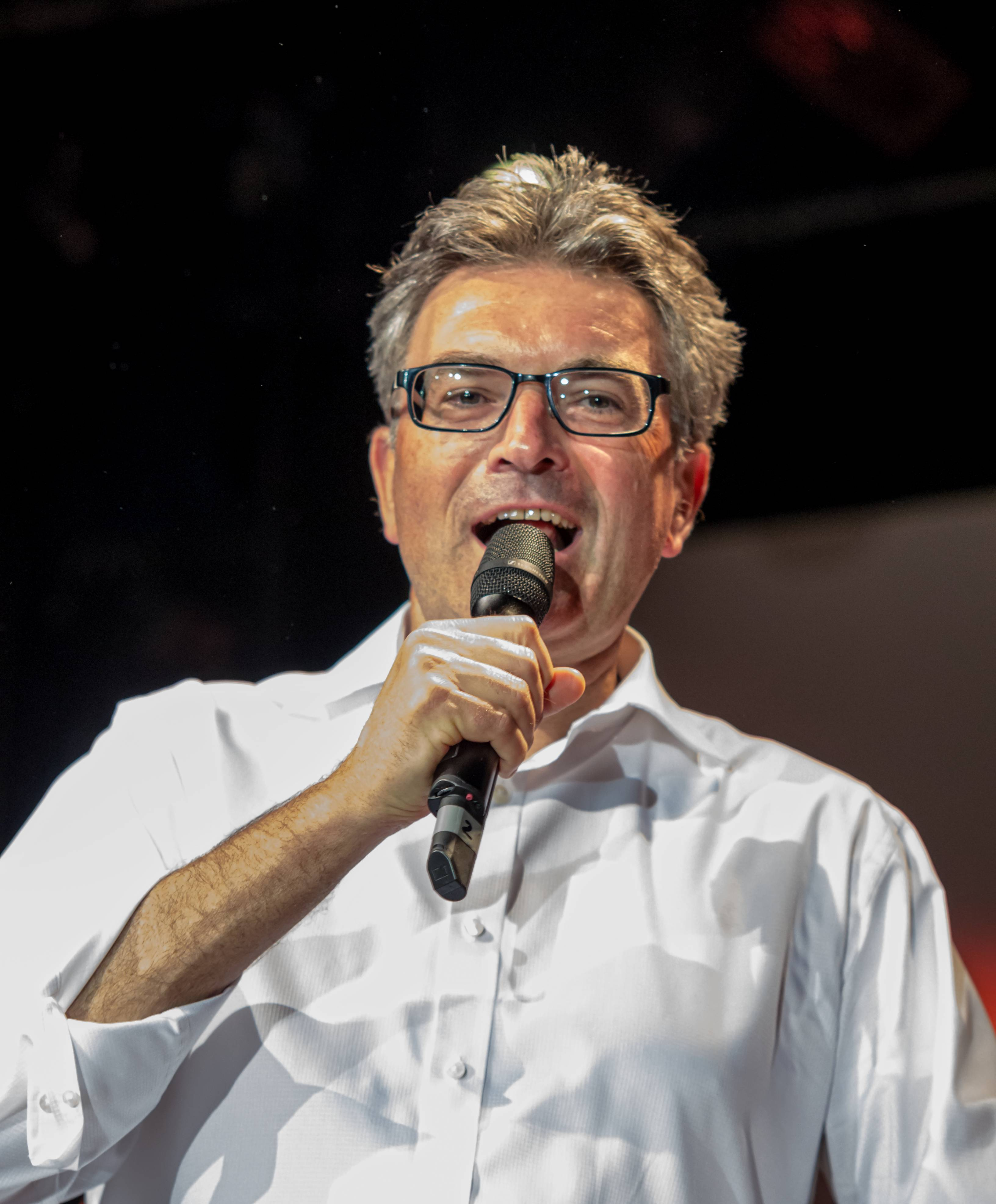 Bilder vom ZMF 2015 Die Gala am 12. 07. 2015